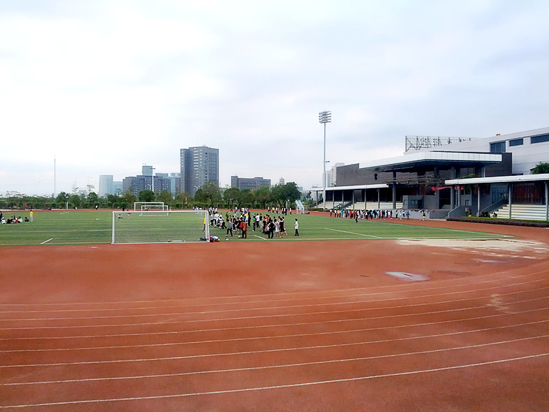 中文（中国大陆）: 厦门工学院校园-操场